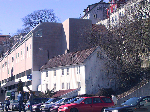 Eldre tømmerhus ved Kittilsbukt i Arendal, kjent som Det hvite hus på Sanden. Revet 2004 for gjenoppføring.